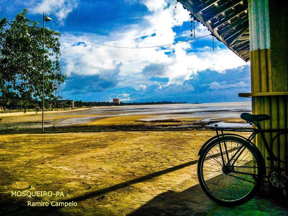 Porto Arthur einsamer Strand descreve a mutabilidade temporal focalizada no contraste :homem e natureza revelando, insignificância diante do universo.